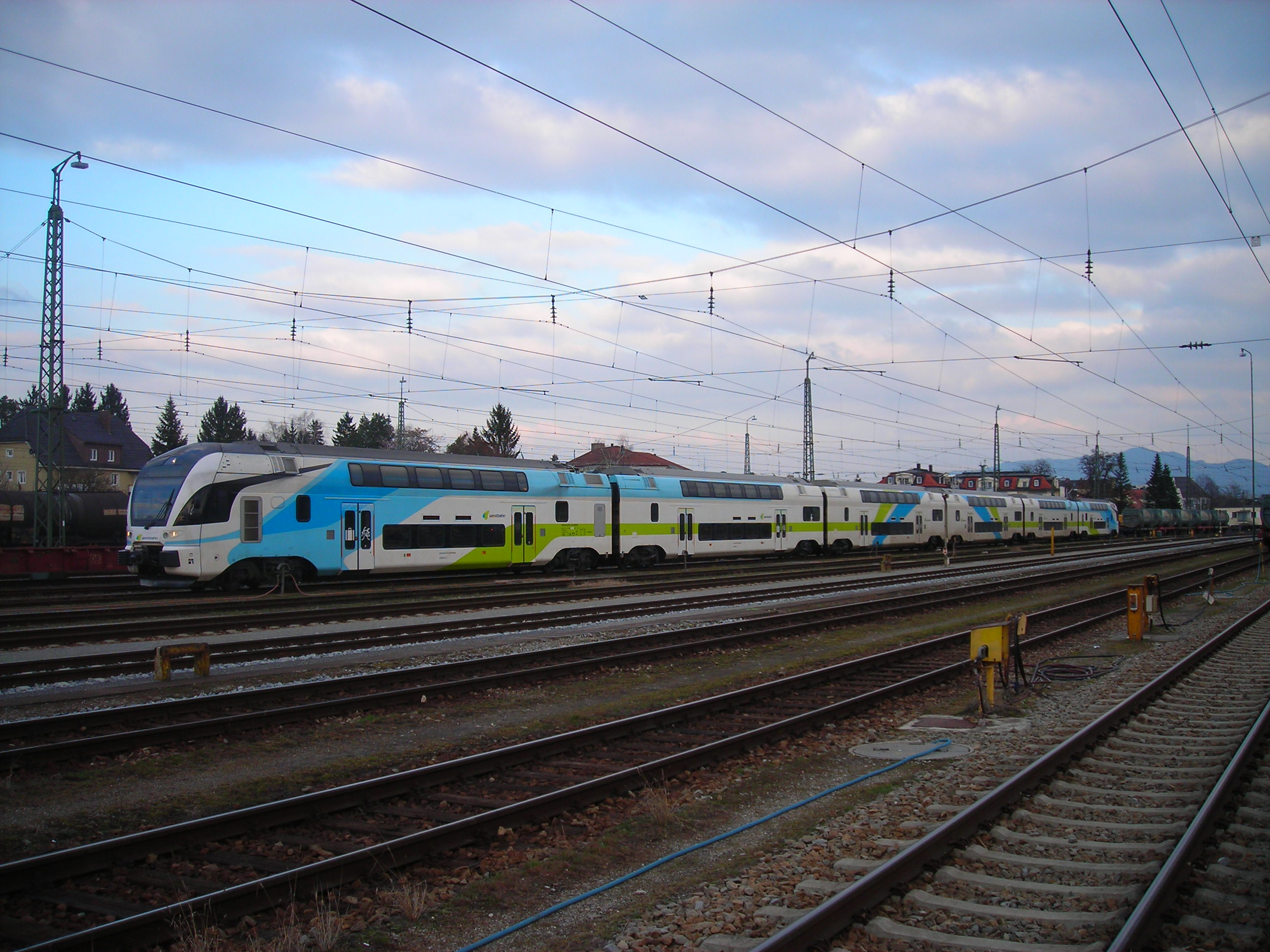 A WESTbahn GmbH motorvonata Freilassing állomáson